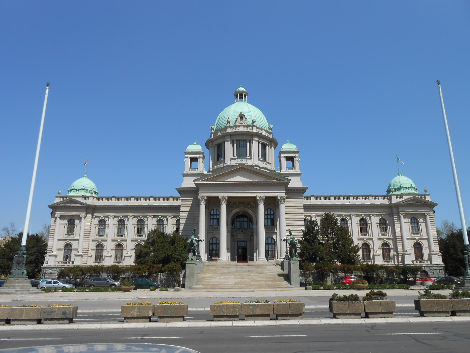 Srpski (latinica): Narodna skupština Republike Srbije